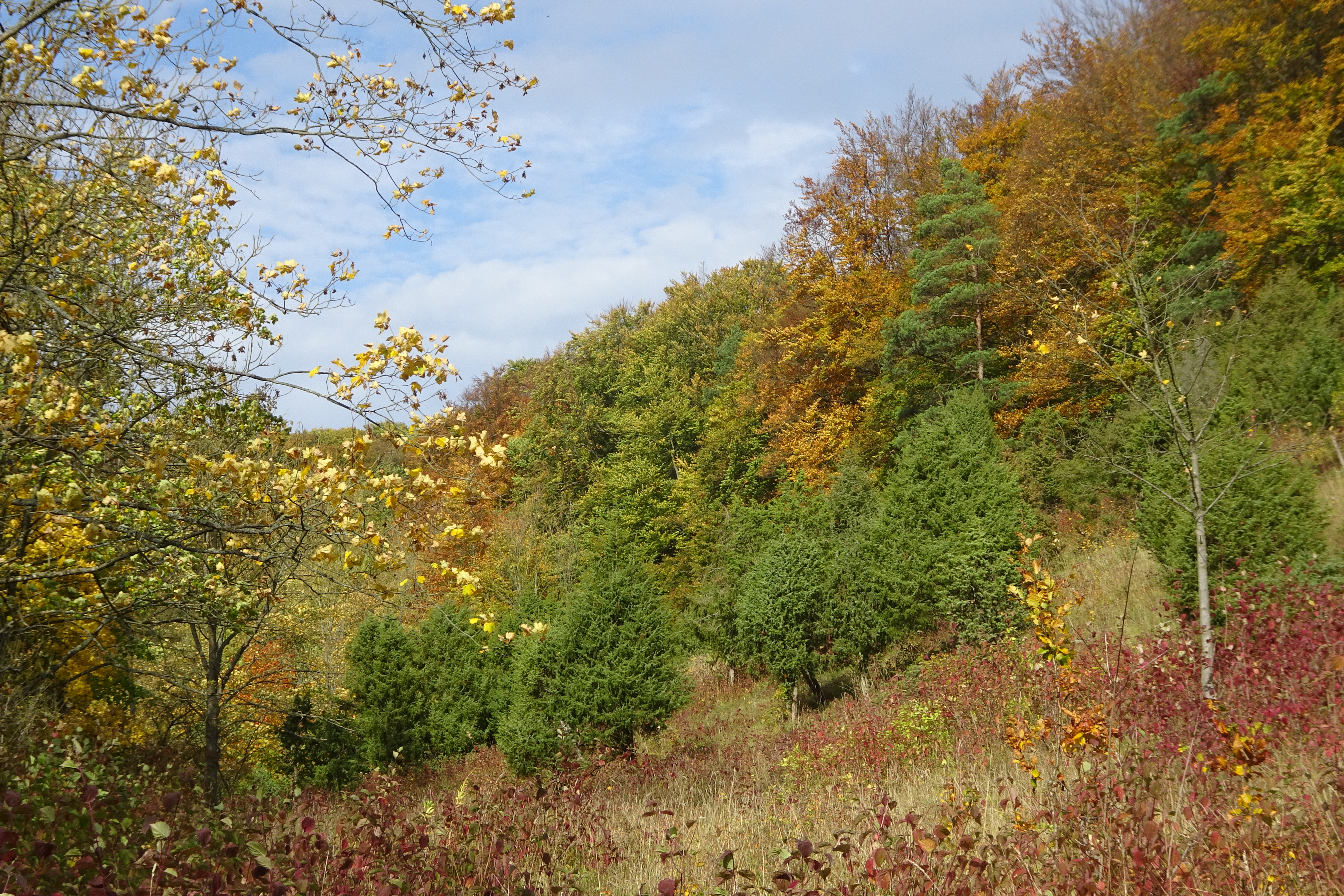 Der Iberg bei Markershausen ist eine 434 m hohe Erhebung am südlichen Rand des Ringgau-Hochplateaus im nordhessischen Werra-Meißner-Kreis. Auf den flachgründigen Böden nehmen artenreiche Laubmischwälder mit einer reichen Bodenflora den größten Teil des Gebietes ein. Um diesen wertvollen Lebensraum, mit den hier lebenden Tier-und Pflanzenarten zu erhalten, wurde der Südwesthang im Jahr 1988 als Naturschutzgebiet ausgewiesen und seit 2008 ist er auch Teil des Flora-Fauna-Habitat-Gebiets „Wälder und Kalkmagerrasen der Ringgau Südabdachung“.